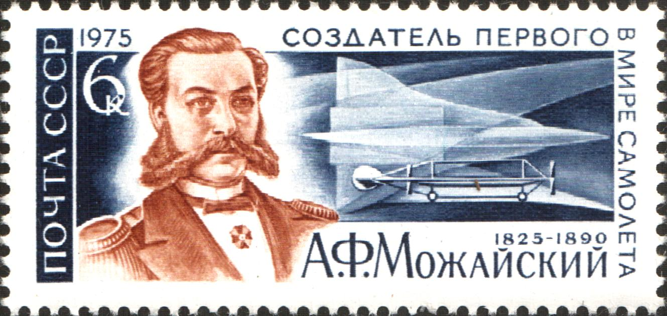 150-летие со дня рождения А. Ф. Можайского (1825-1890). Марка СССР 1975г., номинал - 6коп.